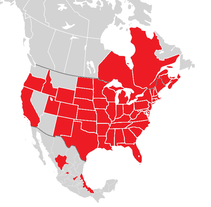 Distribution of Diadophis punctatus. Only states are colored, not the exact distribution. Tagged version of North America second level political division 2 and Greenland.svg